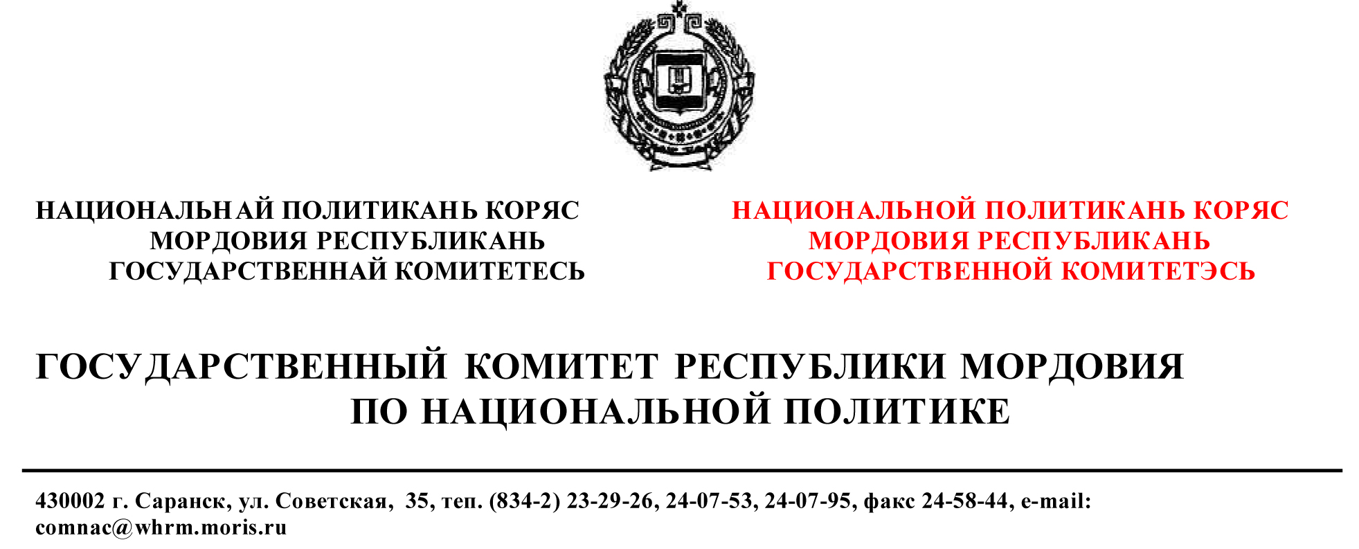 Эрзянь: те максозь сулей-скан Мордовиянь раськень комитетенть ветямо прякс сёрмадцомат, косо невтезь якстересэ эрзянь кельсэ ветямось